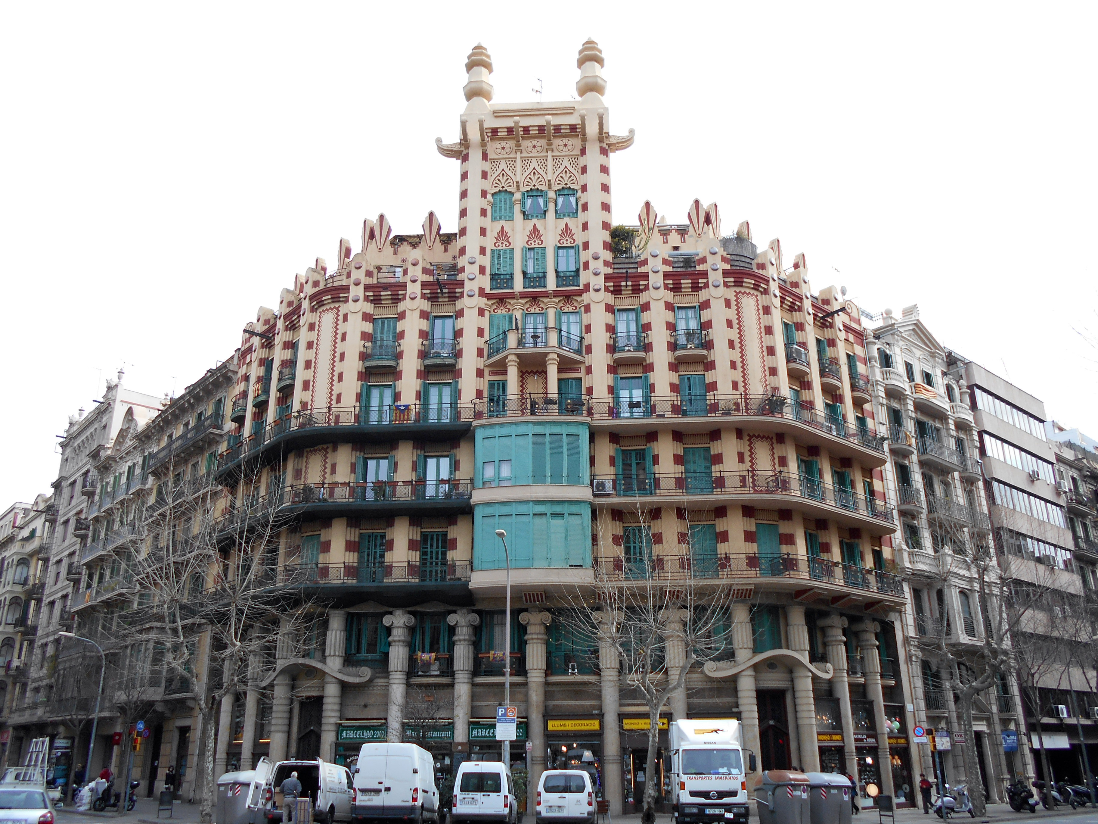 Can Guardiola o “Casa China” (1929), de Joan Francesc Guardiola, Barcelona.